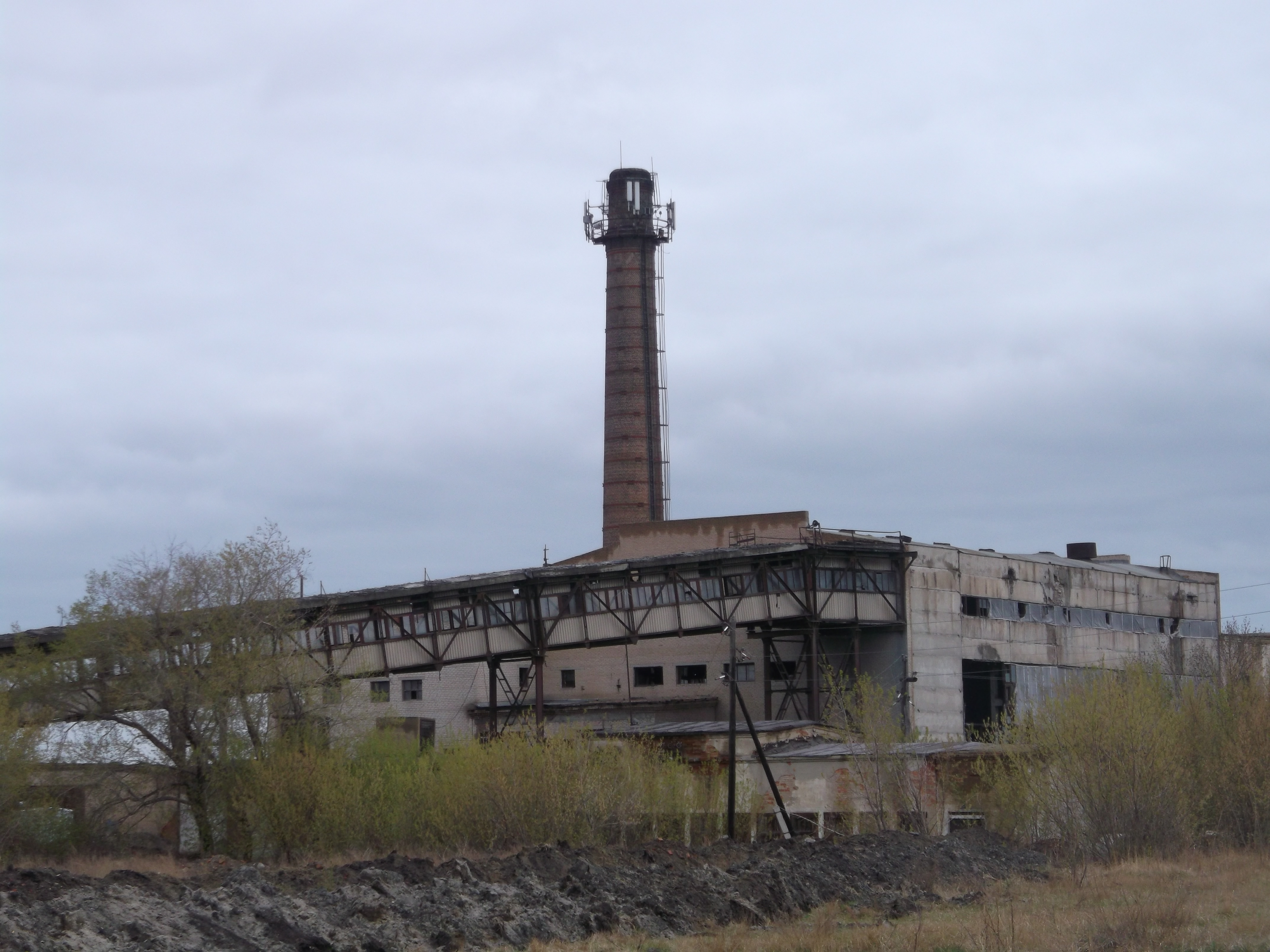 бывшая шахта Подозерная